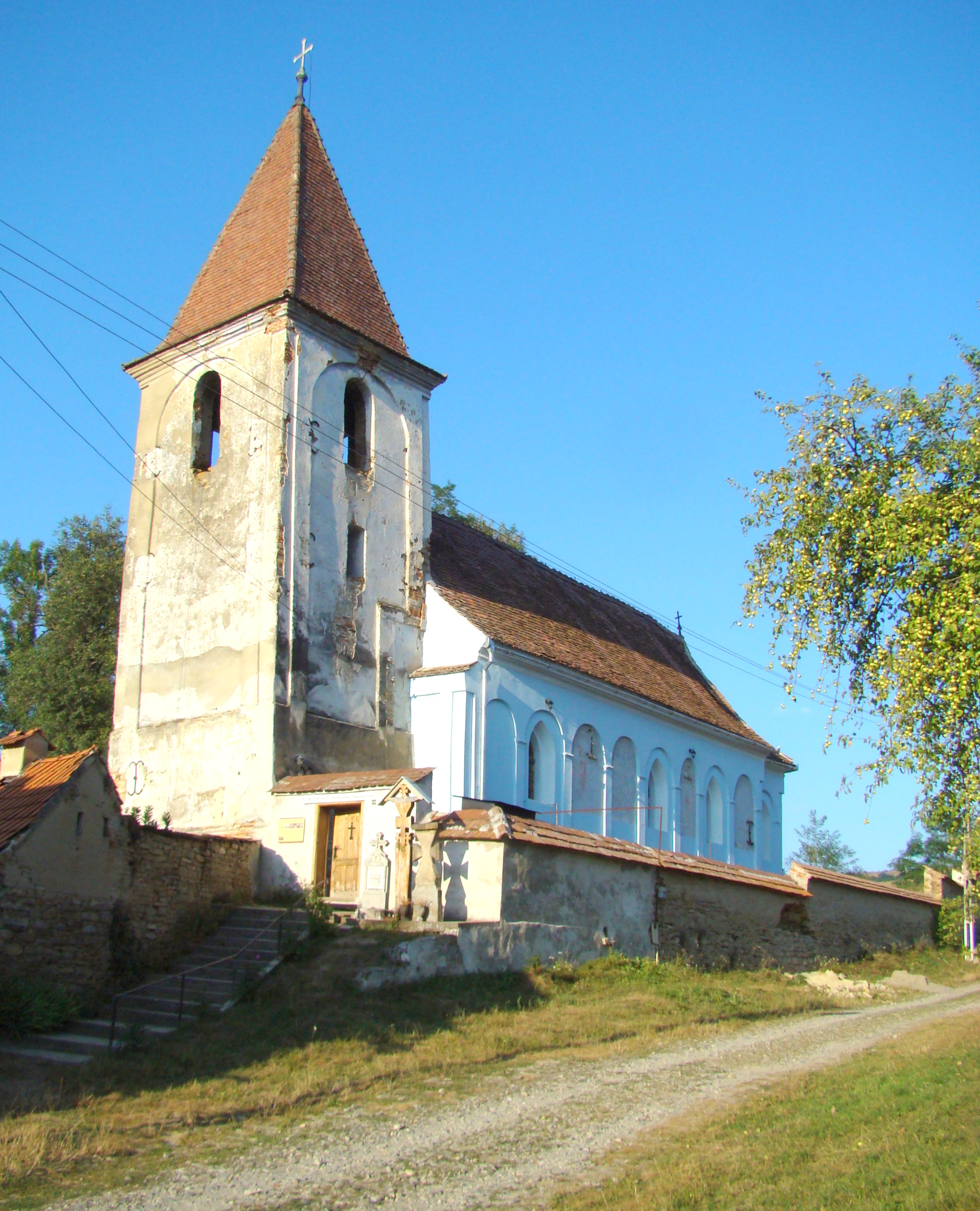 Biserica "Adormirea Maicii Domnului", sat SĂSĂUŞ; comuna CHIRPĂR